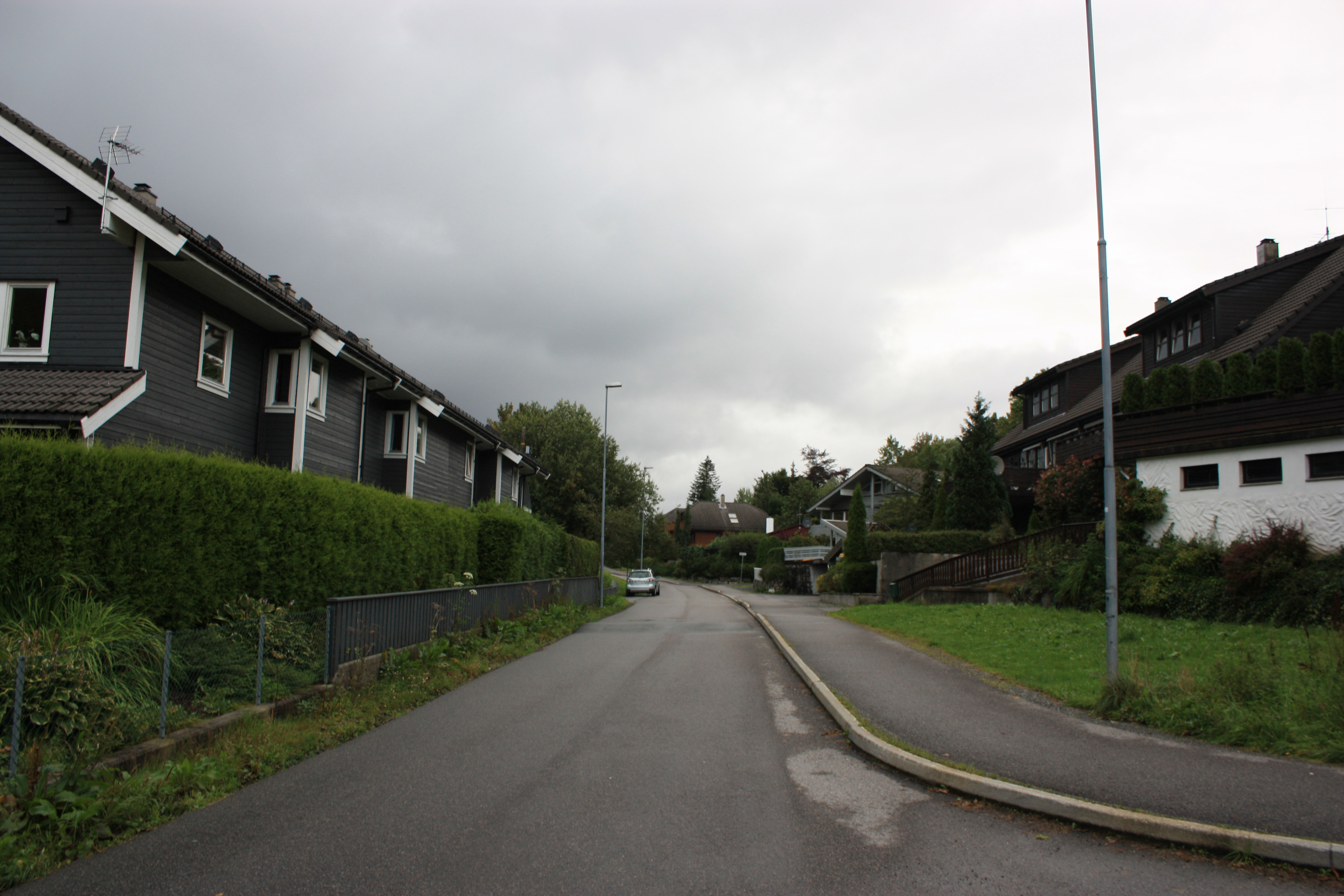 Skjoldvegen, Fana, Bergen.